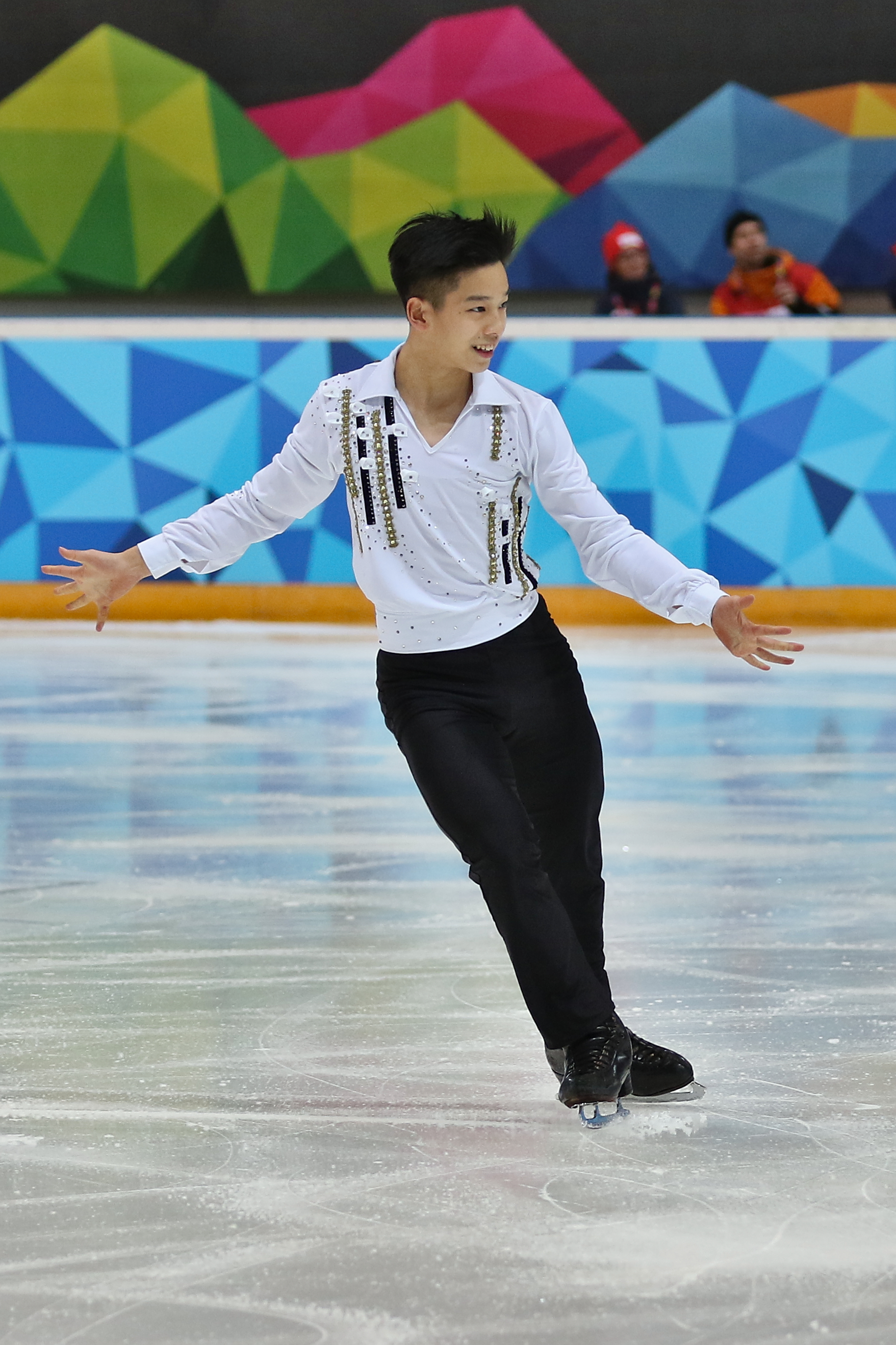 Lillehammer 2016 - Figure Skating Men Short Program - Kai Xiang Chew